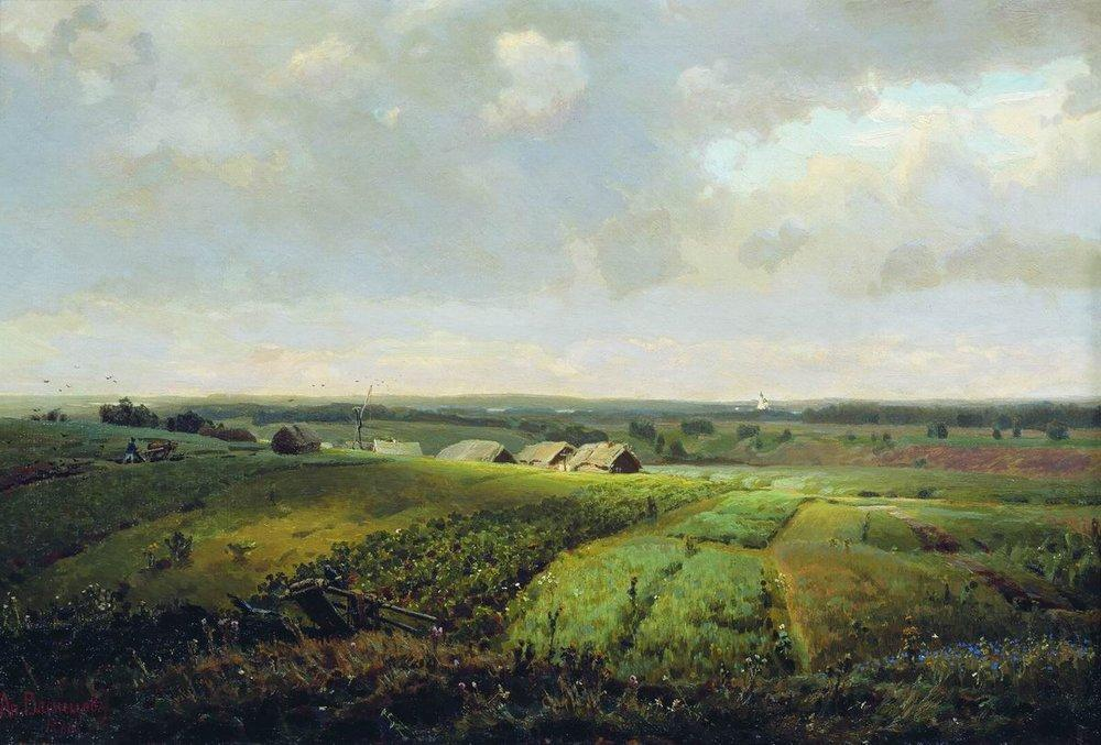 А. М. Васнецов. «Родина». 1886. Холст, масло. 49 × 73. Государственная Третьяковская галерея, Москва.